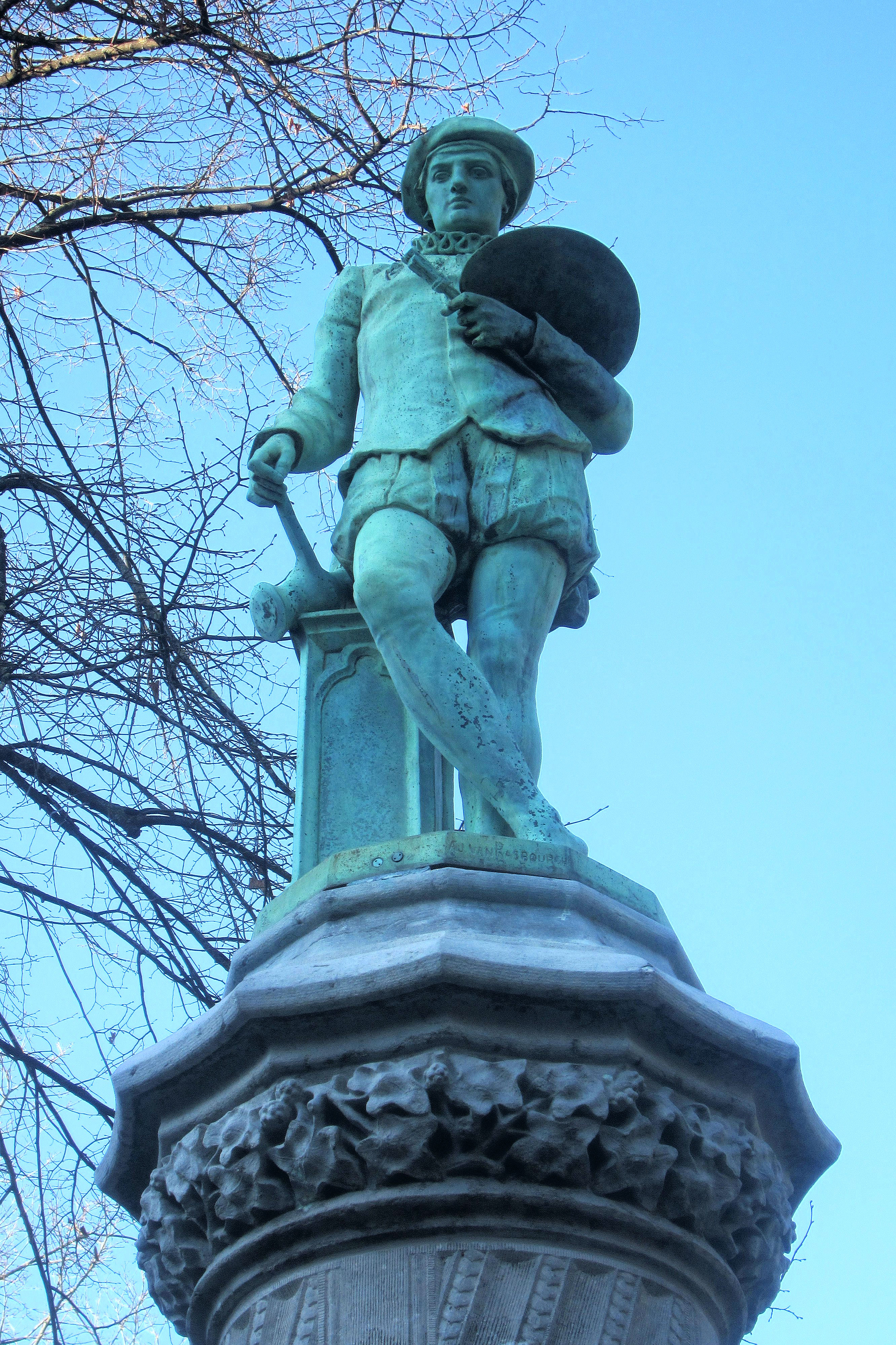 Kleine Zavel, Brussel, bronzen beeld op sokkel (Schilders, Goudslagers en Glazeniers, door Antoine-Joseph Van Rasbourgh)